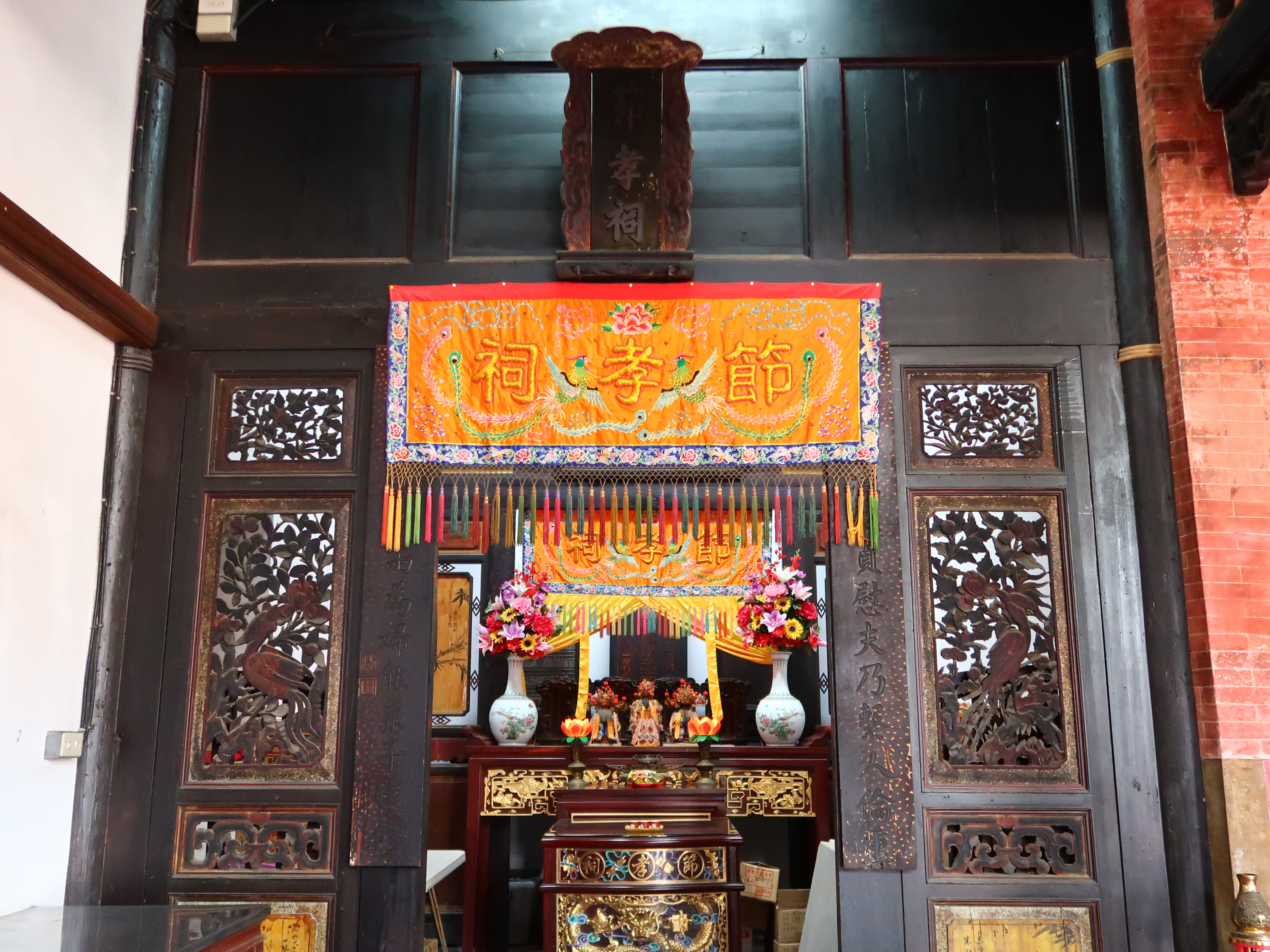 上聯：「聖柏操凜松貞慰夫乃繫人倫重」下聯：「愛妻風經苦雨為婦能兼子職修。」 日治時期澎湖廳稅檢吏鄭子清題（媽宮舉人鄭步蟾三子）